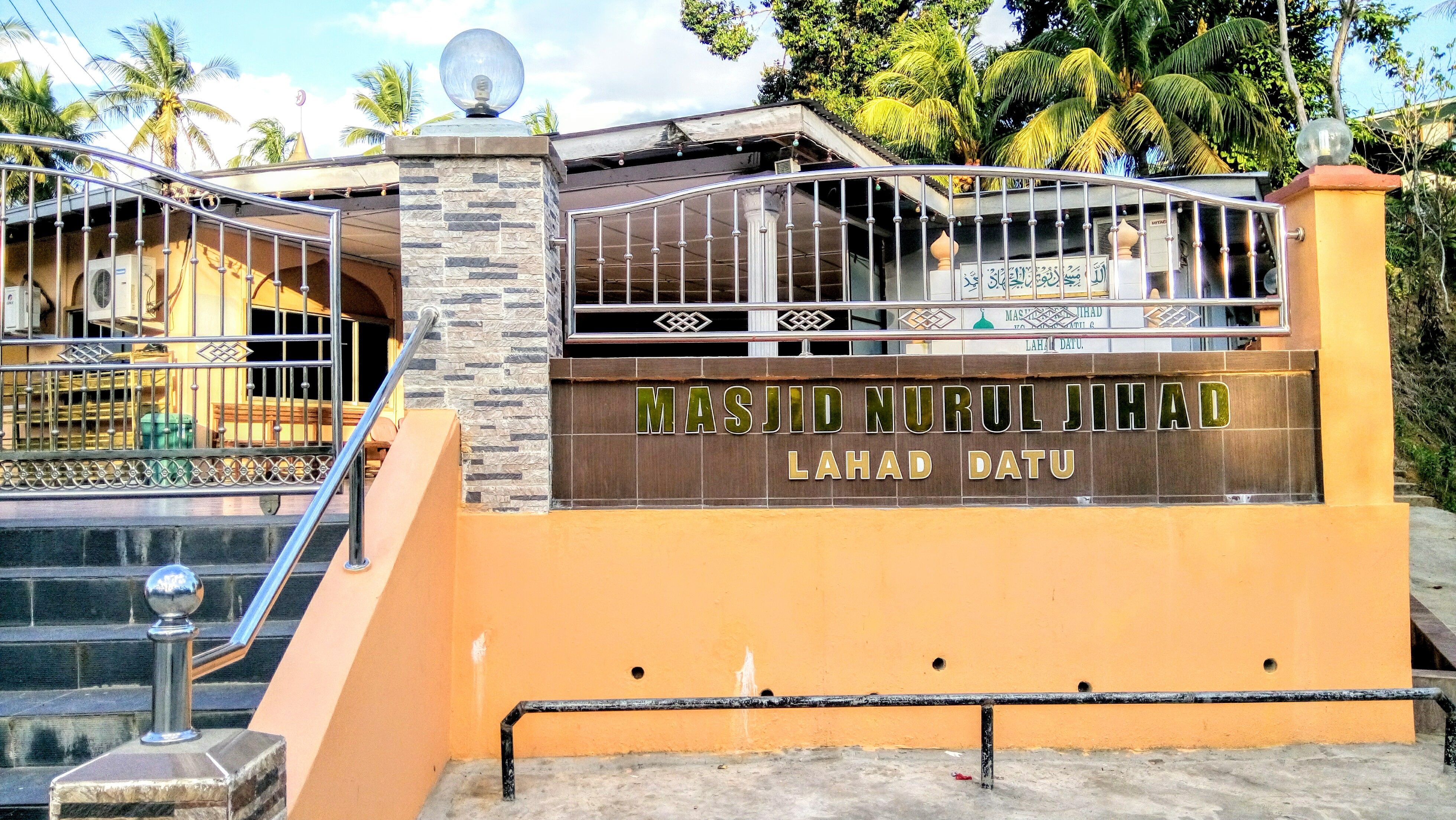 Masjid di Lahad Datu